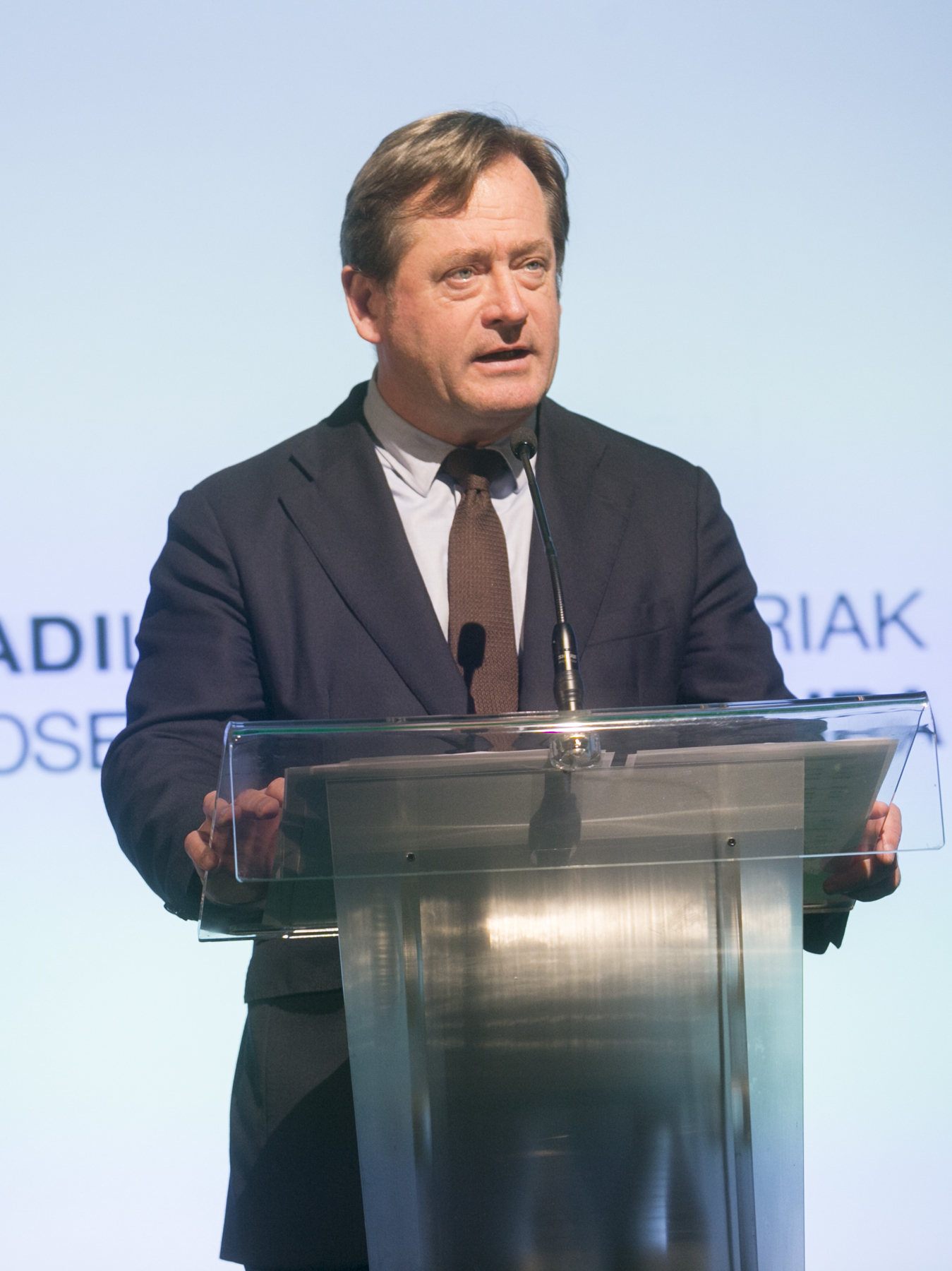 El Lehendakari Iñigo Urkullu ha presidido hoy la gala de entrega de los Premios Euskadi de Literatura, un acto que ha tenido lugar en Azkuna Zentroa de Bilbao y en el que, por parte del Gobierno Vasco, ha participado también el consejero de Cultura y Política Lingüística, Bingen Zupiria. Al acto han asistido los siete premiados de la presente edición: Asier Serrano, en la modalidad de Literatura en Euskera; Fernando Aramburu, en la de Literatura en Castellano; Arantxa Urretabizkaia, Ensayo en Euskera; Ander Izagirre, Ensayo en Castellano; Leire Bilbao, Literatura Infantil y Juvenil; Mikel Valverde, en la modalidad de Ilustración de Obra Literaria; y, por último, Matías Múgica, Traducción de Obra Literaria en Euskera.